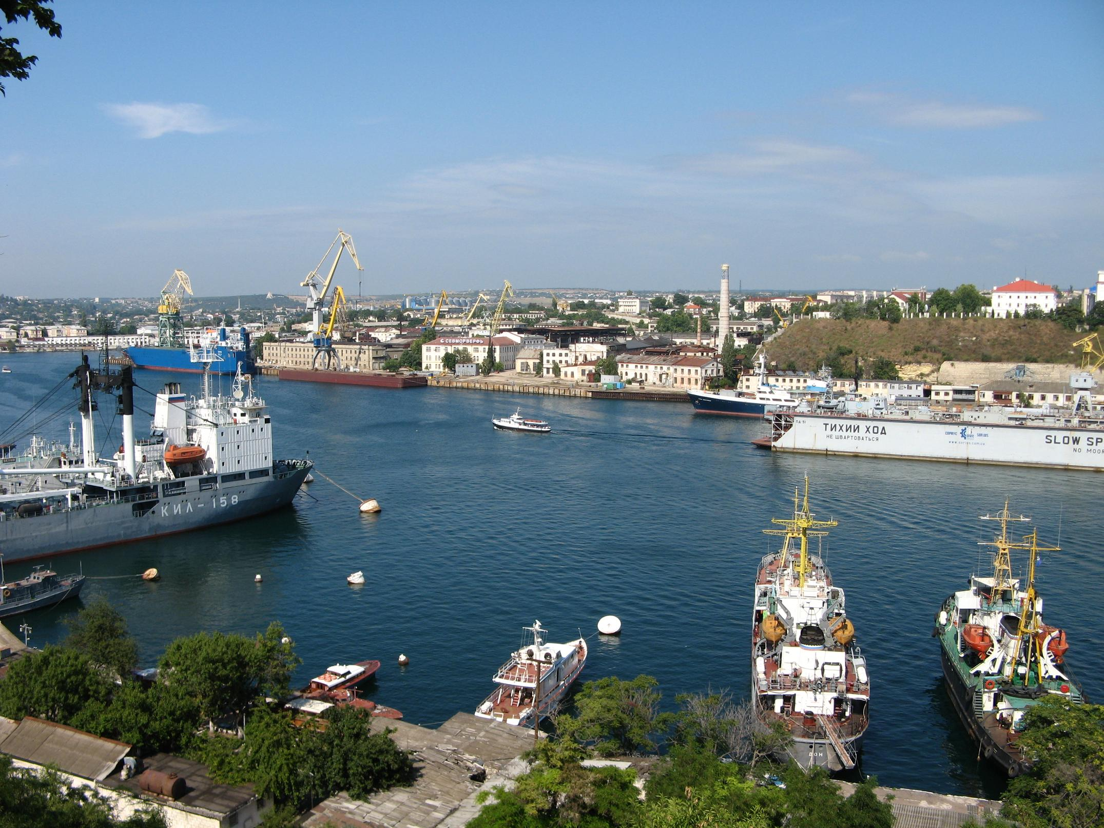 Вид на СМЗ и мыс Лазарева с Южной стороны